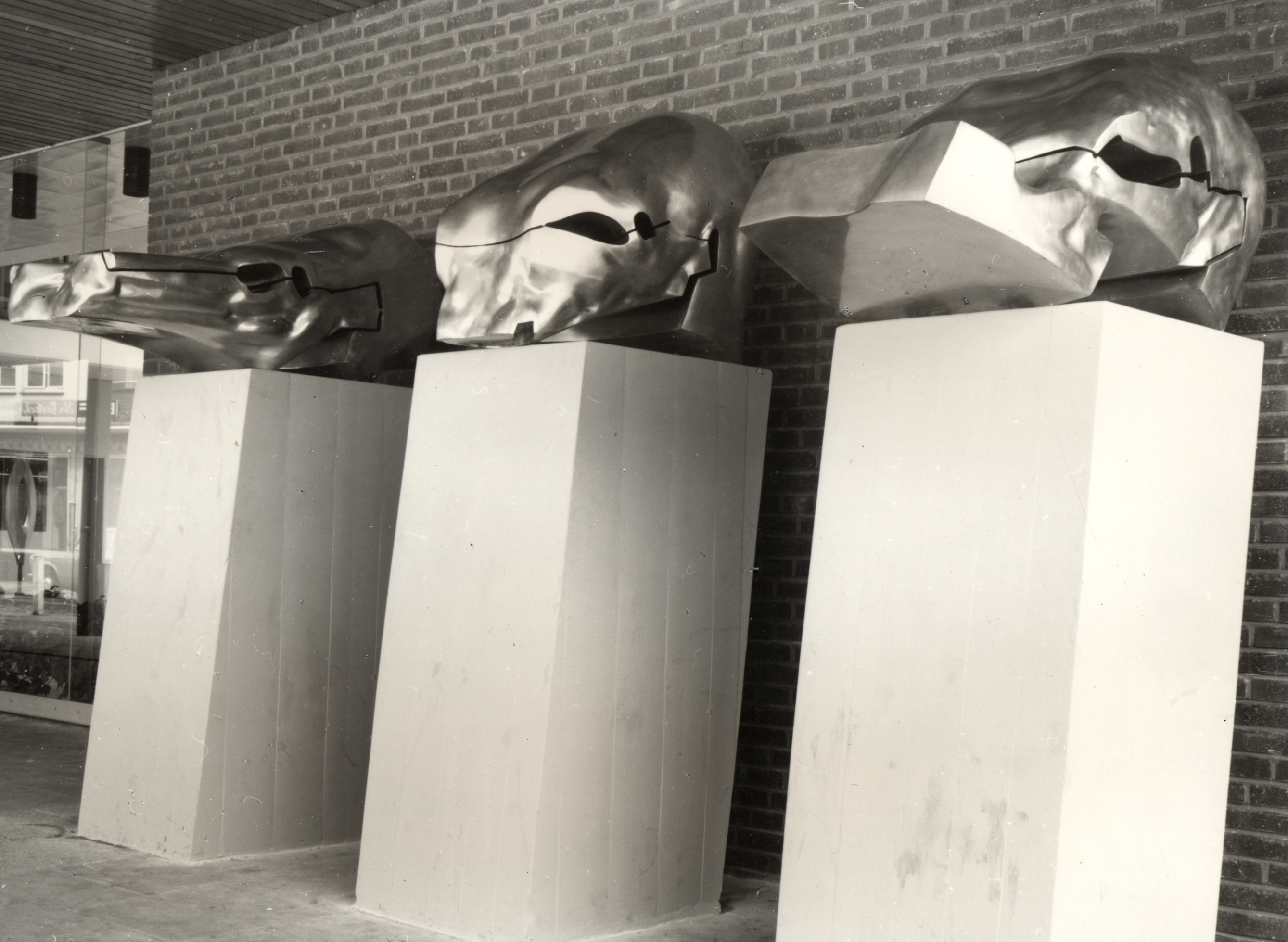 Louis Niebuhr, Be-Hauptungen, 1974, Bronze, Präsident-Kennedy-Platz, Bremen